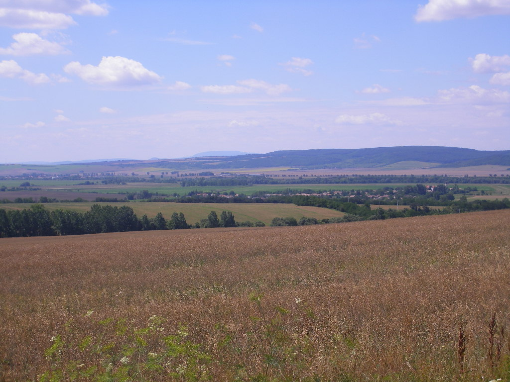 Nagybörzsöny - kilátás a Ganádi-szőlőhegyről délnyugat felé (háttérben Ipolytölgyes)